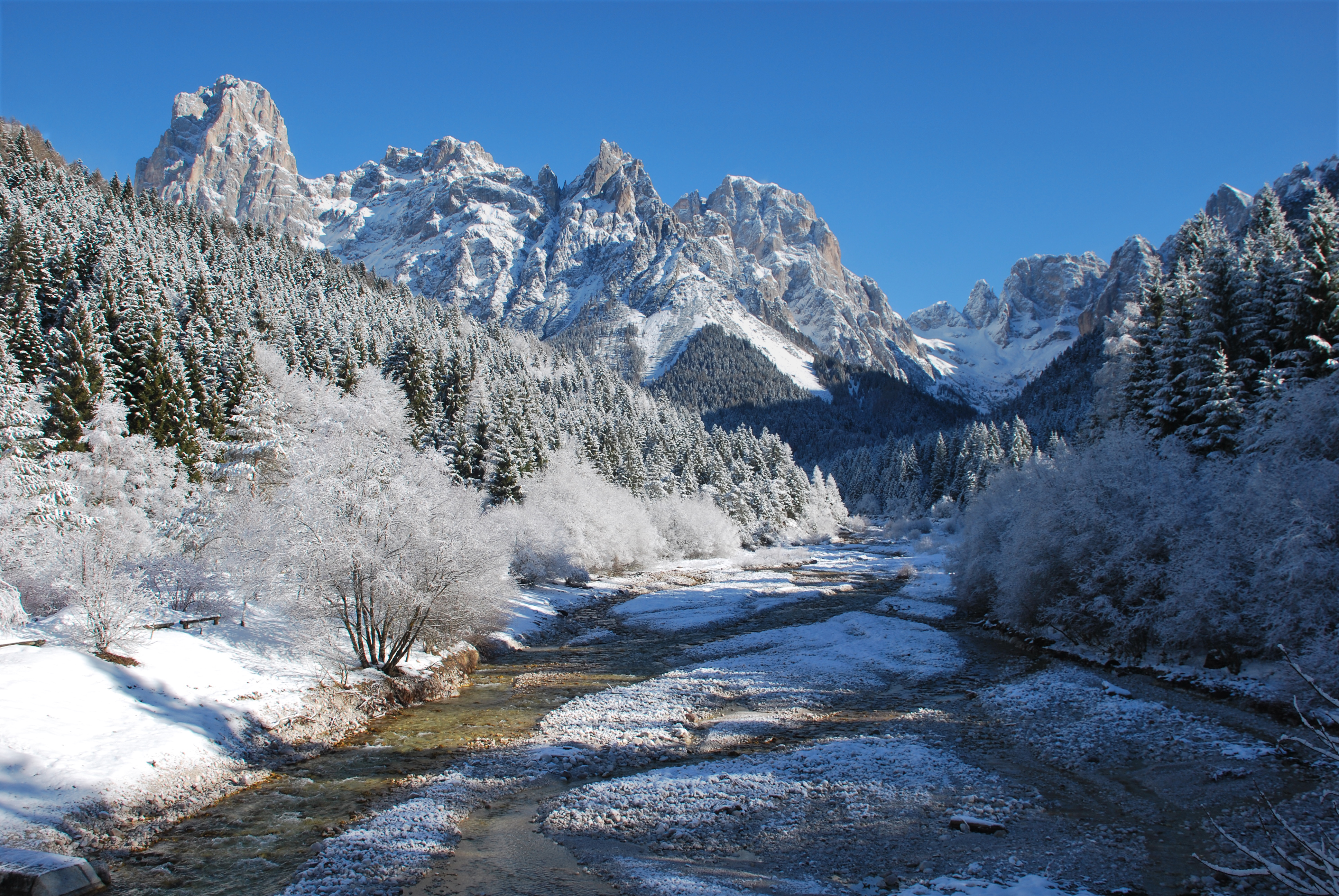 Val canali